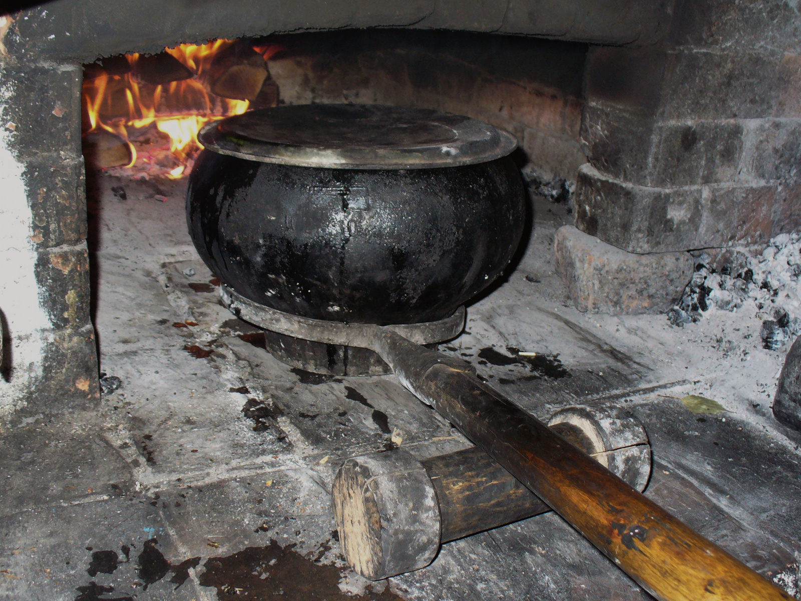 Установка чугуна в печь с помощью ухвата